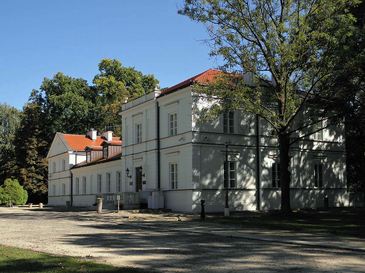 Warka - Winiary, pałac (dec. dwór), XIX